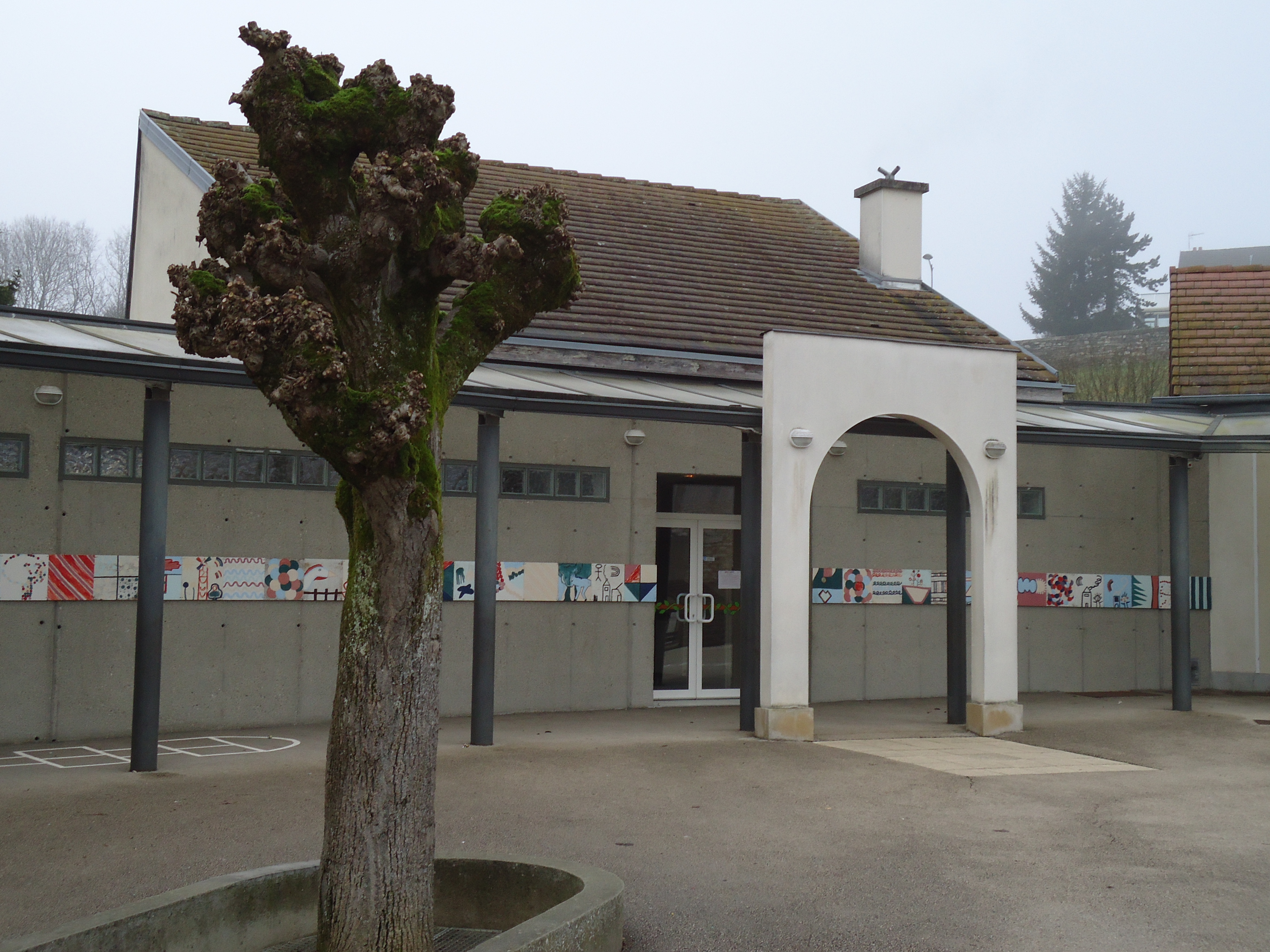 Ecole de Choisey